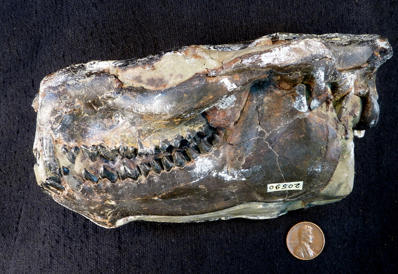 Protoreodon pumilus (Marsh)